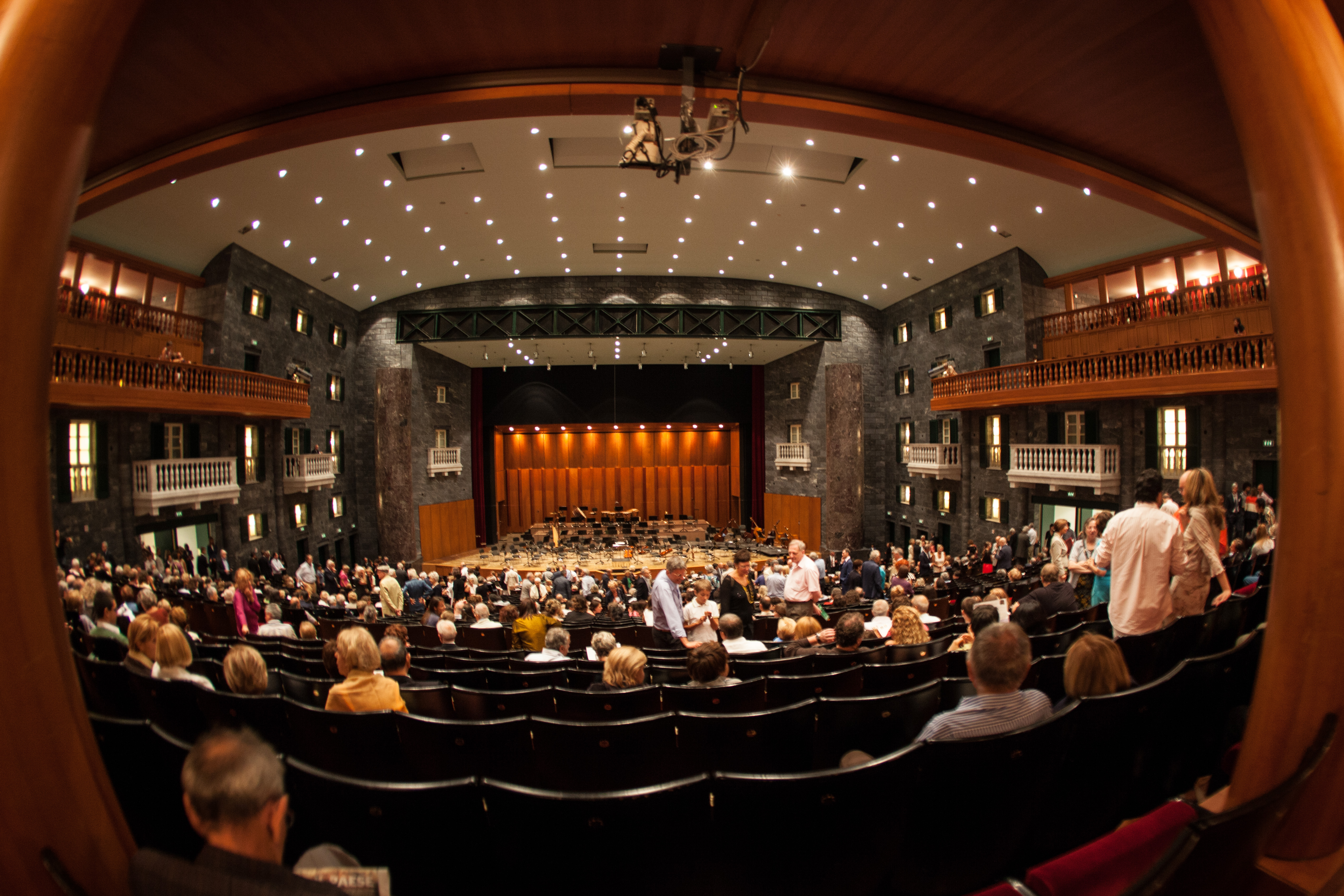 Teatro Carlo Felice, platea durante un'intervallo. This is a photo of a monument which is part of cultural heritage of Italy.